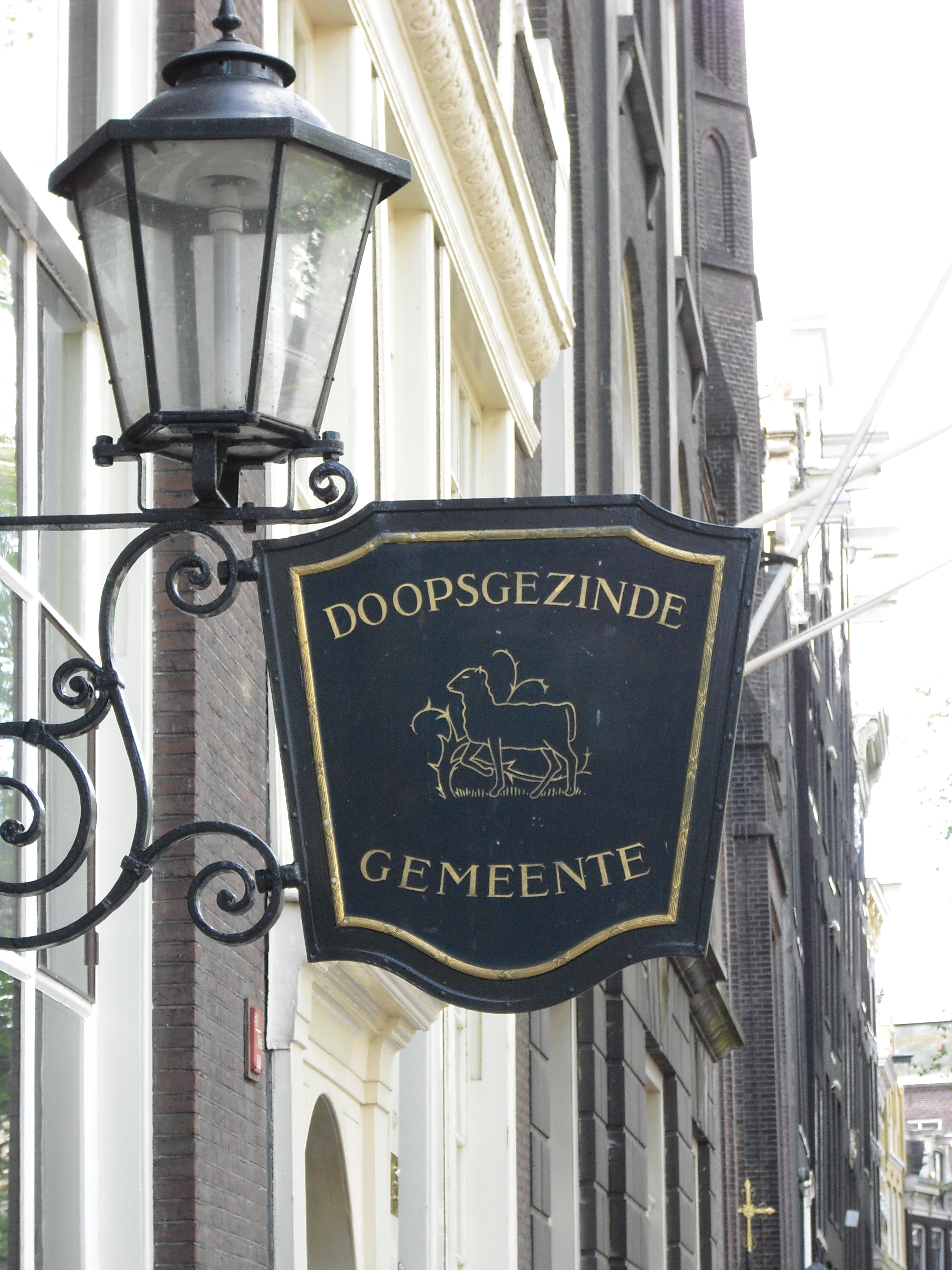 Schild an der Doopgez. Gemeente (Mennoniten) "Singelkerk" Amsterdam